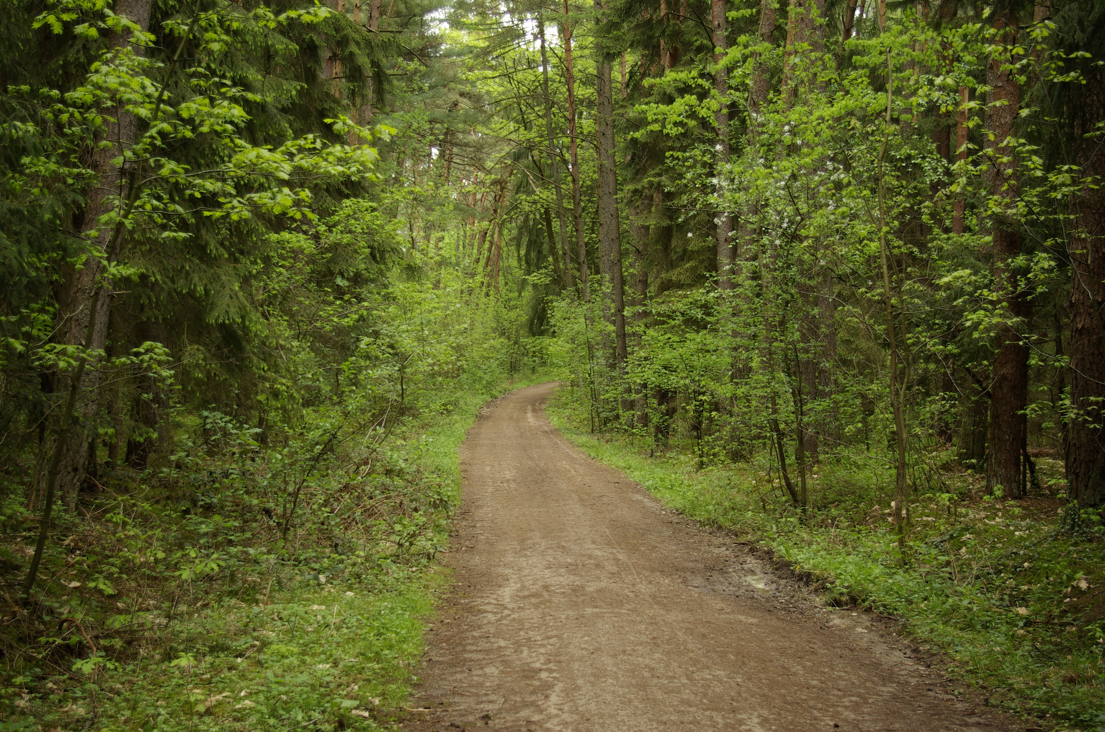 Der Wald Mönau in Erlangen